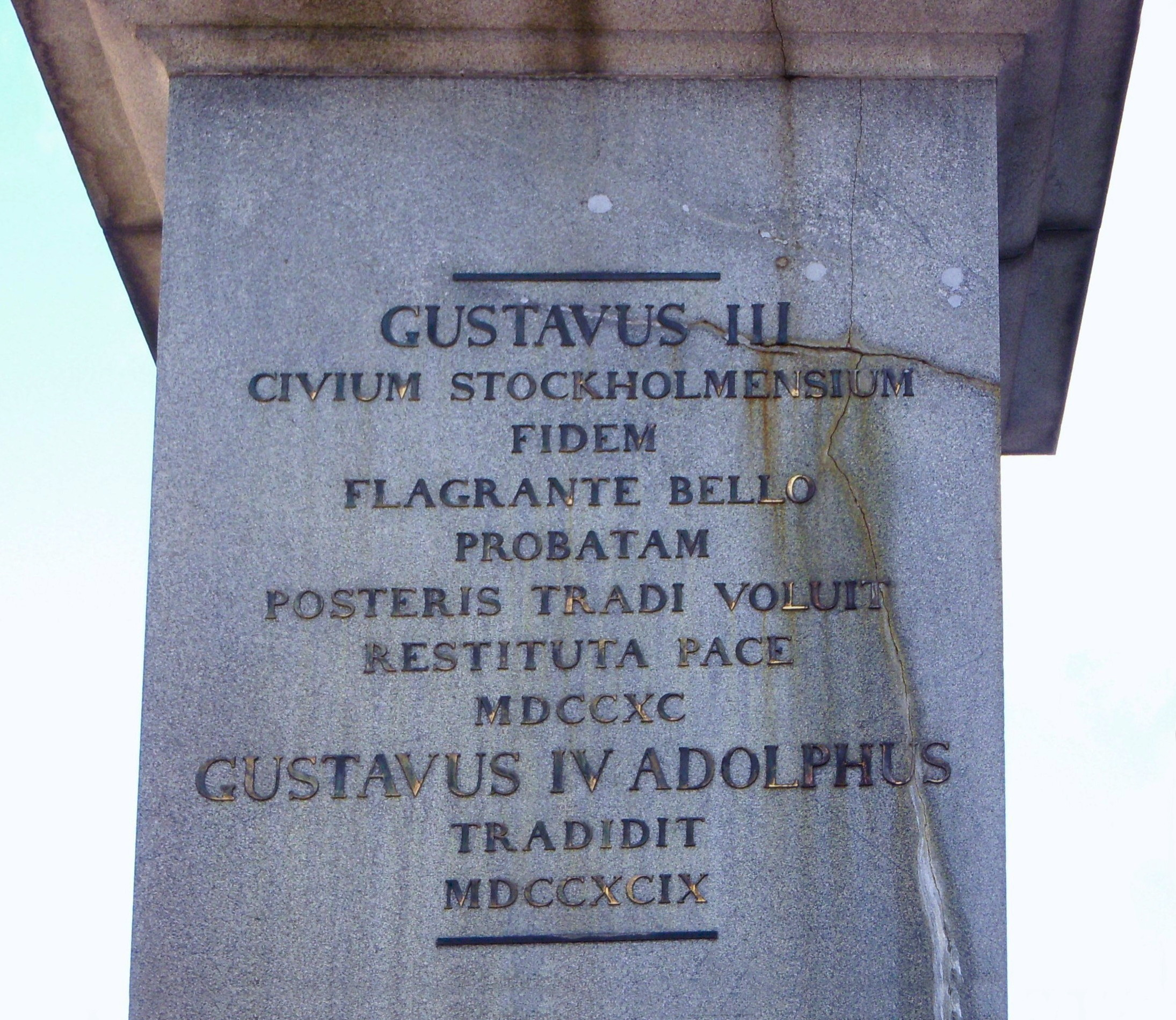 Inskriptionen på obelisken på Slottsbacken i Stockholm